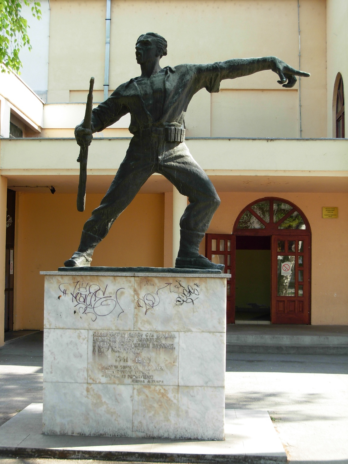 Spomenik borcima NOB u Futogu, ispred muzičke škole.